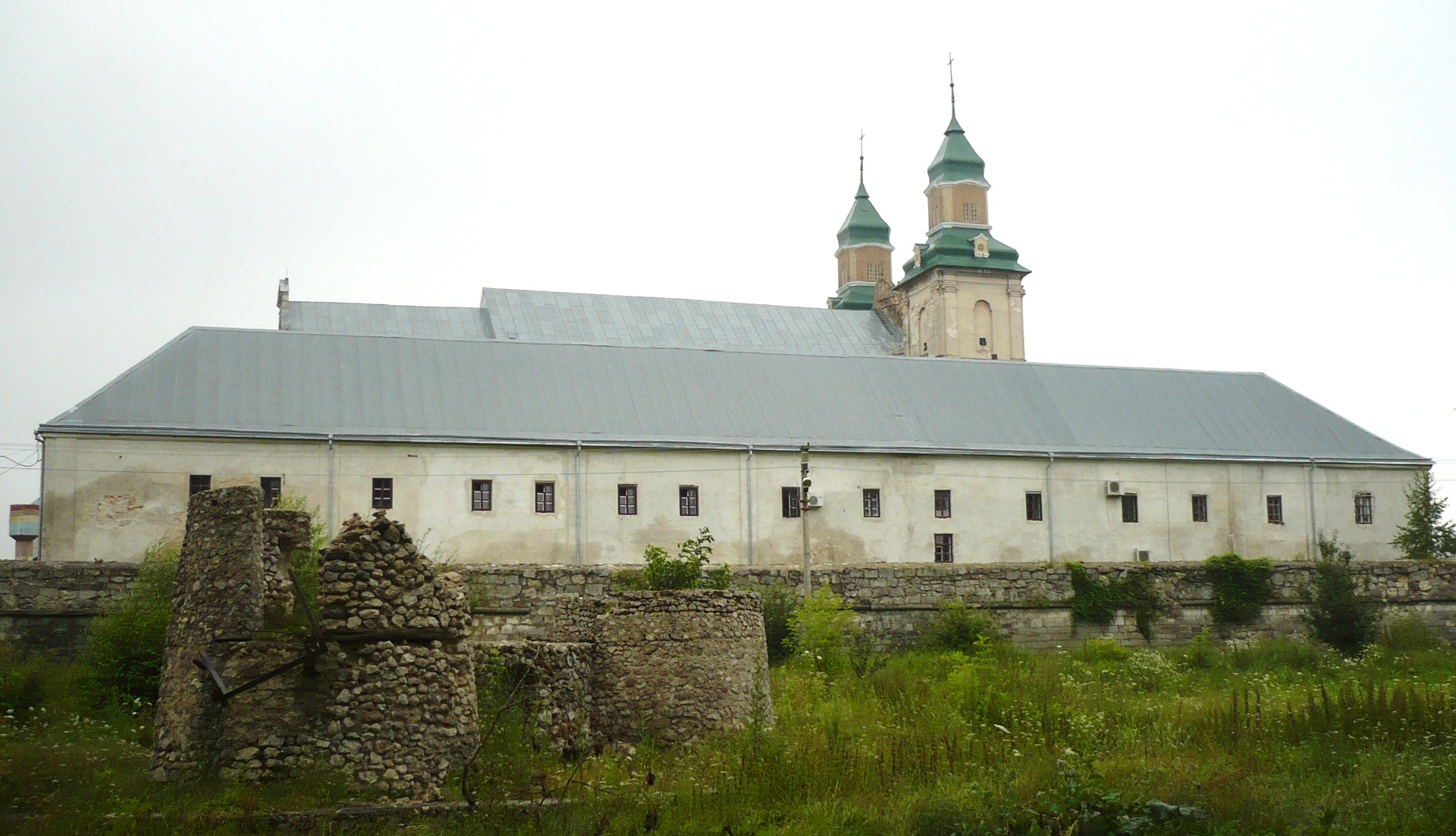 Zbaraż, kościół oo. bernardynów